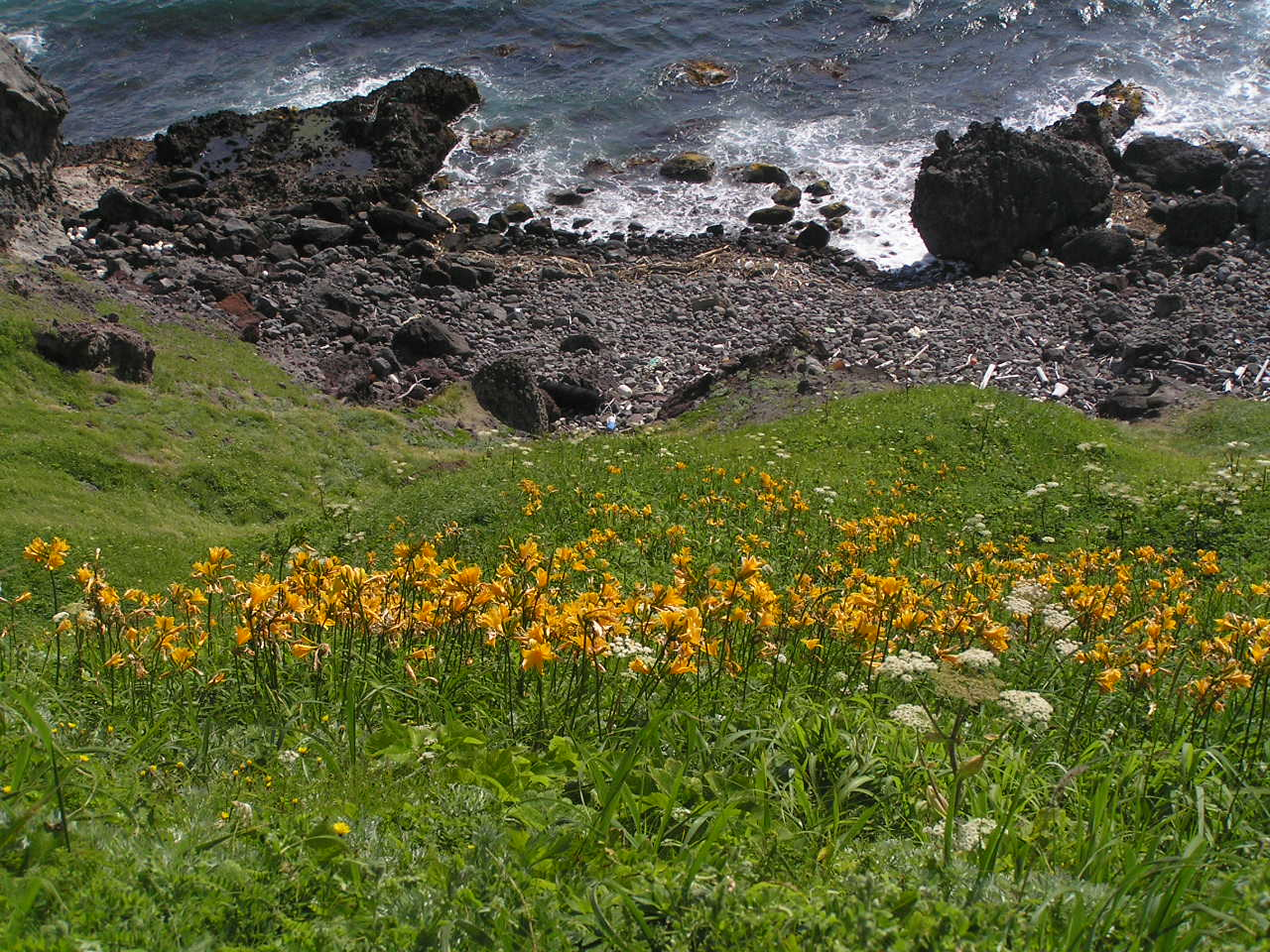 積丹半島エゾカンゾウの群落